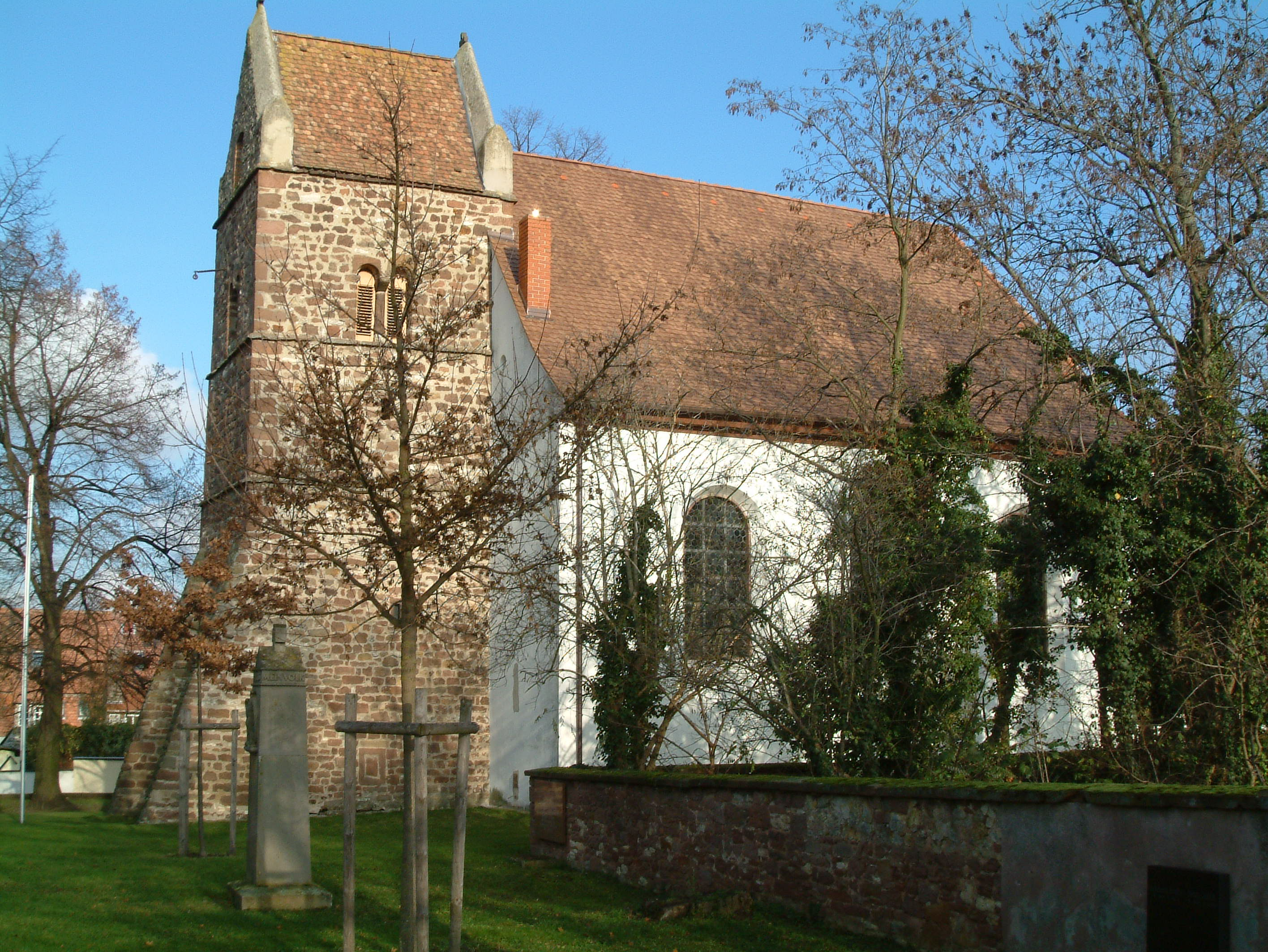 Protestantische Wehrkirche zu Obersülzen, selbst fotografiert am 2006-12-18 und freigegeben durch Benutzer:Mundartpoet